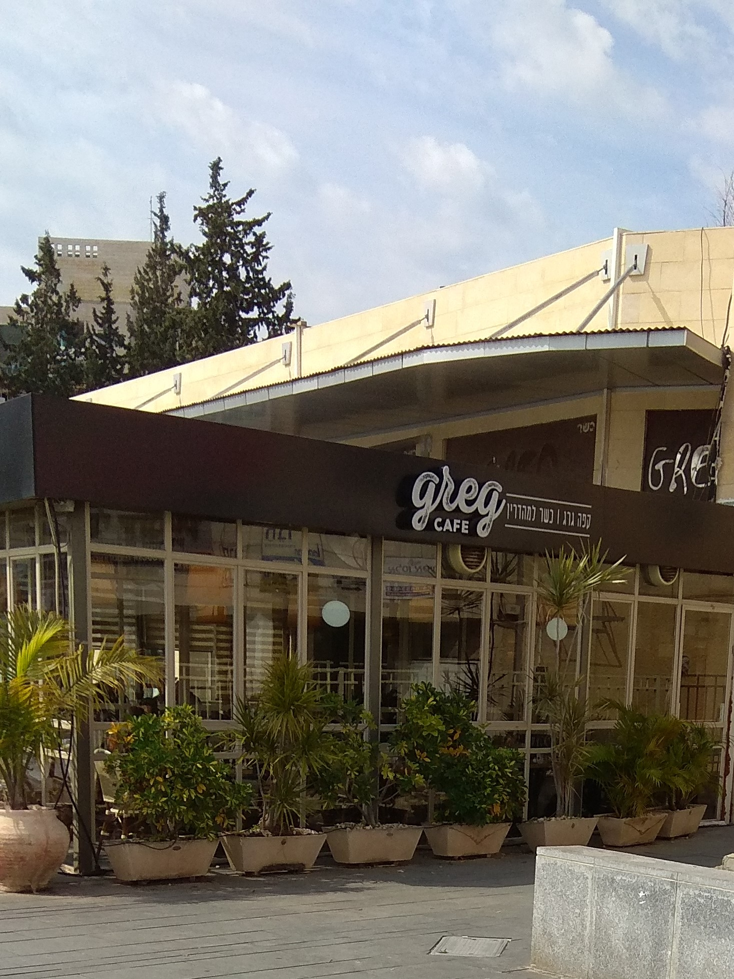 סניף קפה גרג